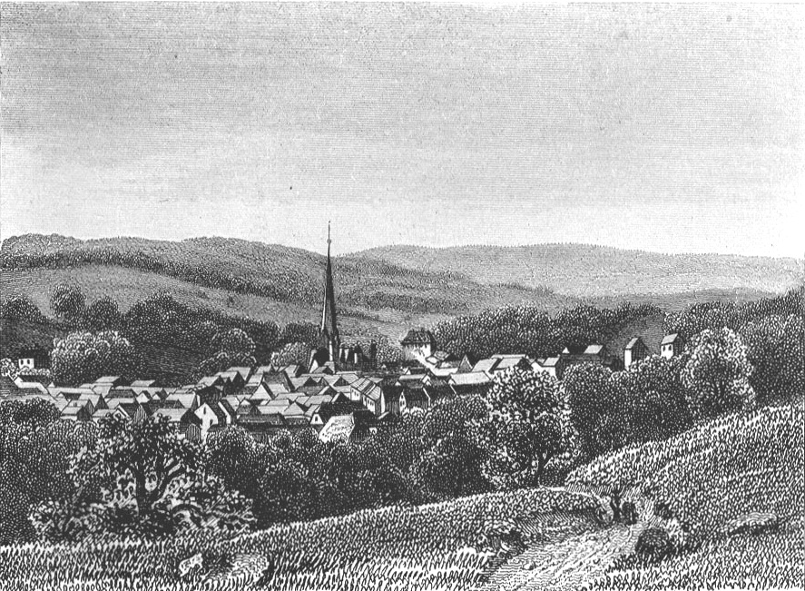 Schotten, 1849, Stahlstich auf Papier · schwarz-weiß